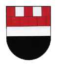 Znak vesnice Želénky